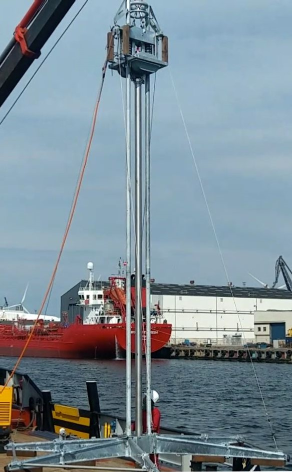 Vibracorer im Direktzug kurz vor dem aussetzen in das Wasser.